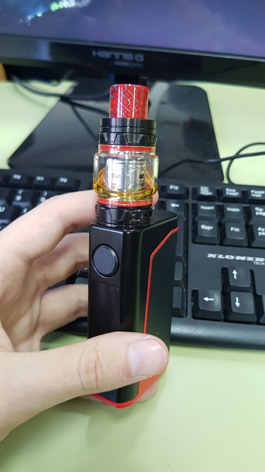 Mod de vapeo junto a su respectivo atomizador